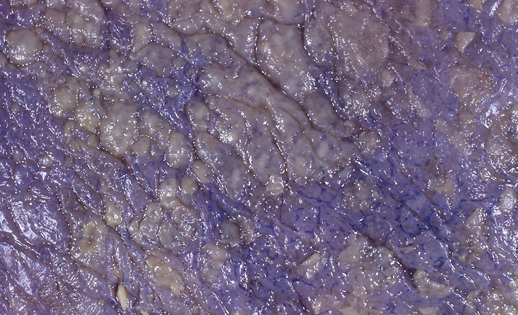 Fibrinous pleuritis